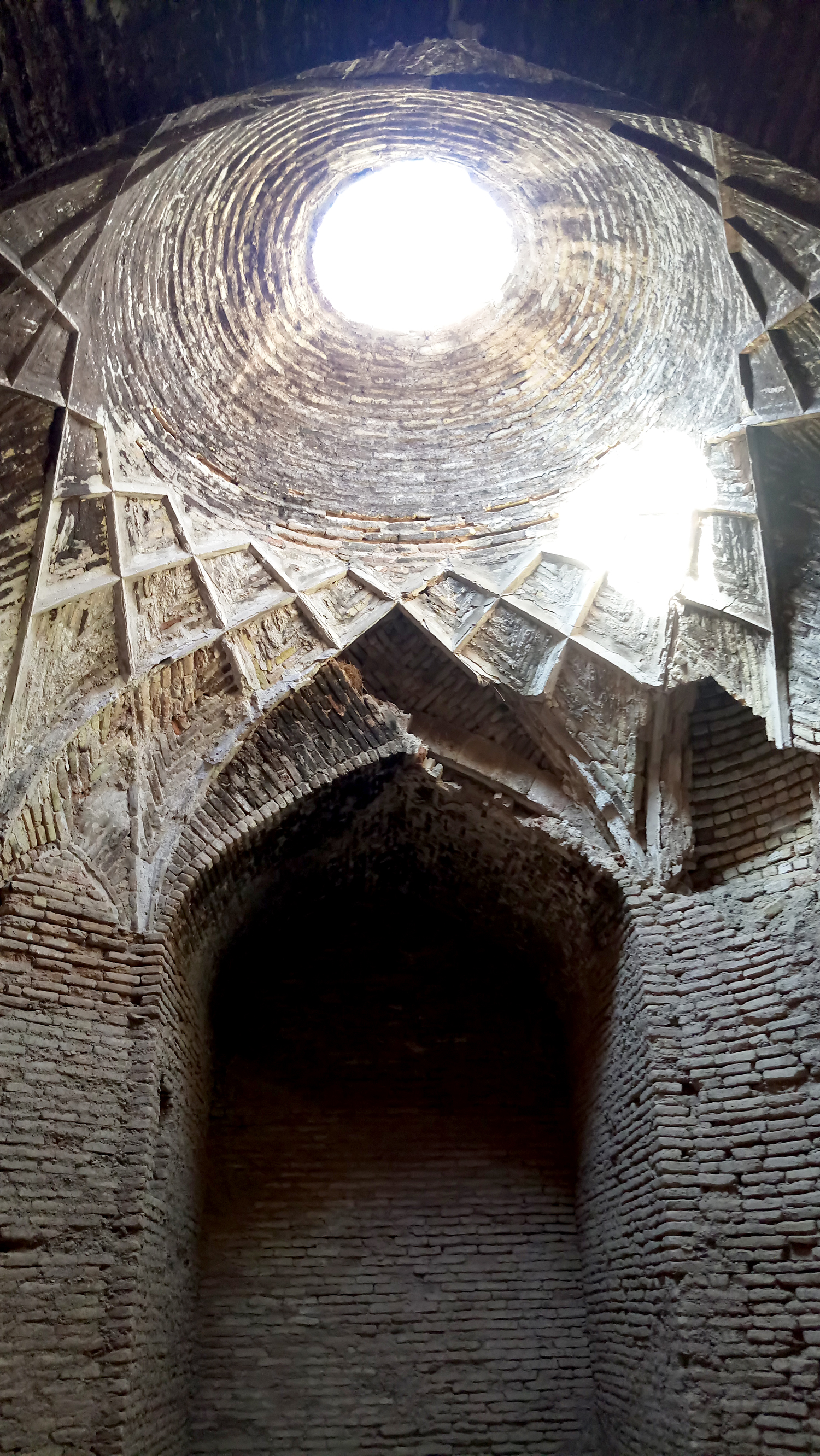 آسیاب آبی شهداد مربوط به دوره قاجار است و در کرمان، جنوب شرقی شهداد، محله رسول آباد واقع شده و این اثر در تاریخ ۷ مهر ۱۳۸۱ با شمارهٔ ثبت ۶۱۲۰ به‌عنوان یکی از آثار ملی ایران به ثبت رسیده است.